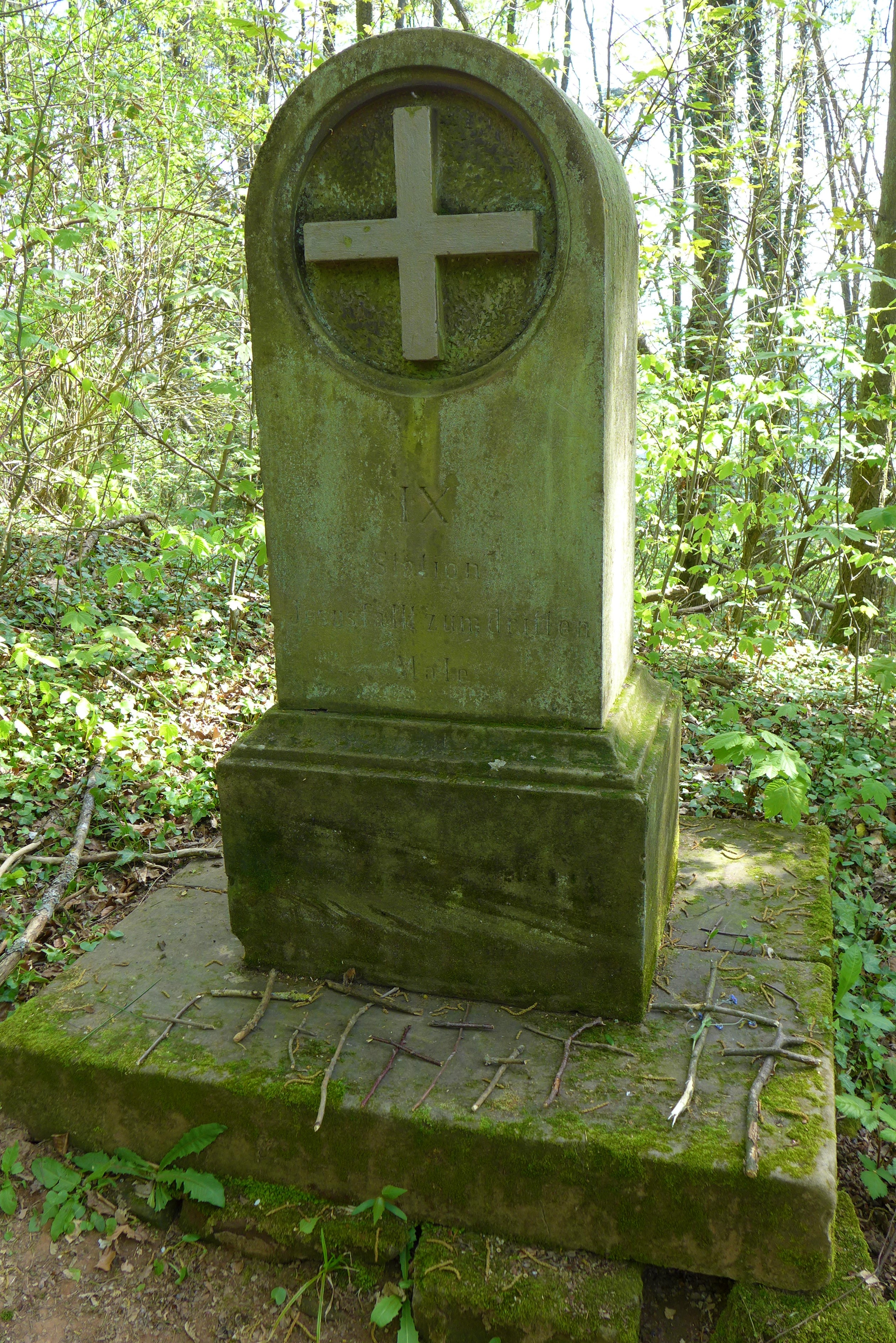 Wallerfangen, Kreuzwegstation am Limberg; Die Limbergpilger legen nach Verrichtung eines Gebetes aus kleinen Ästen gebildete Kreuze nieder.